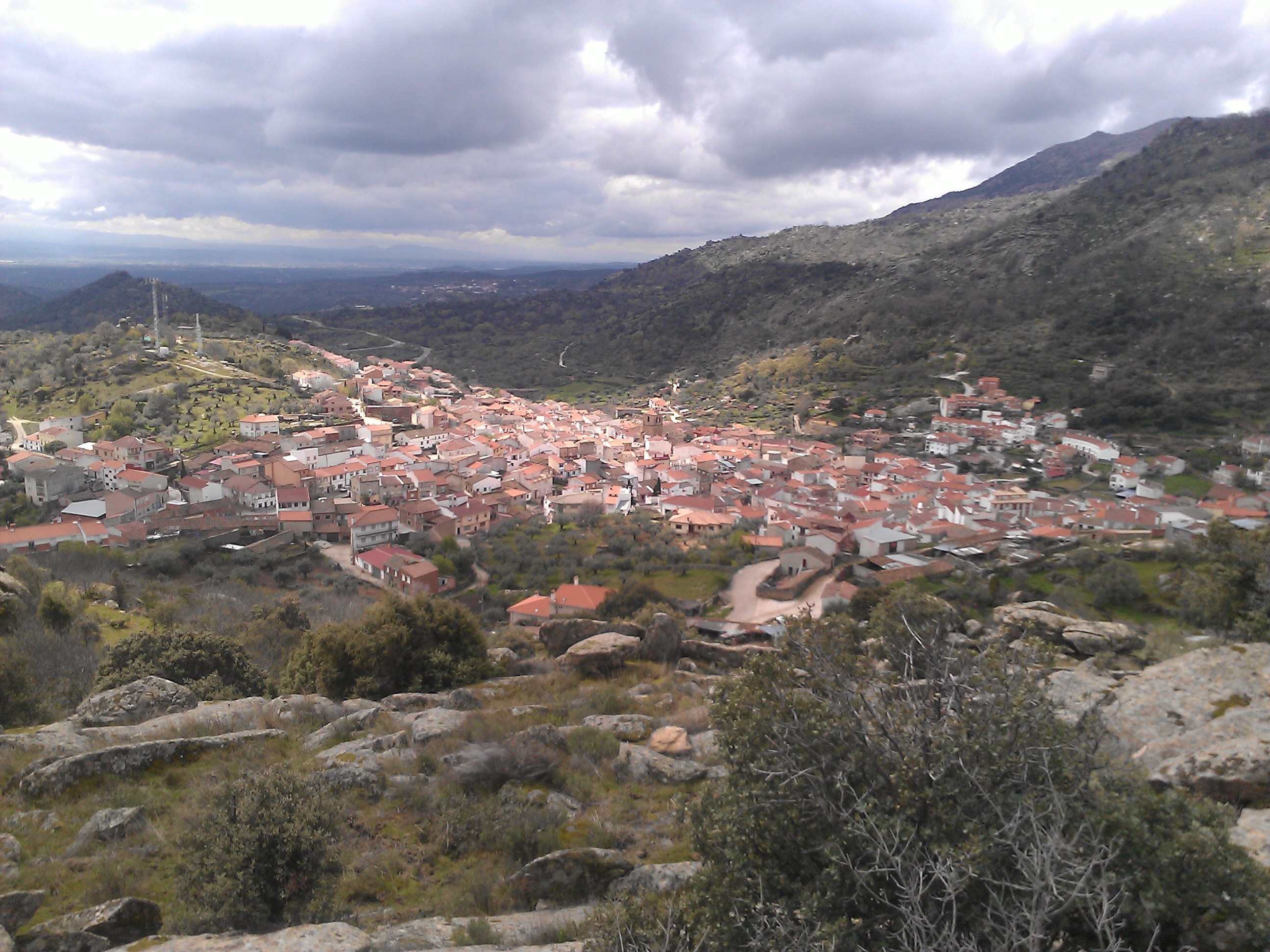 El Real de San Vicente, Toledo (España)